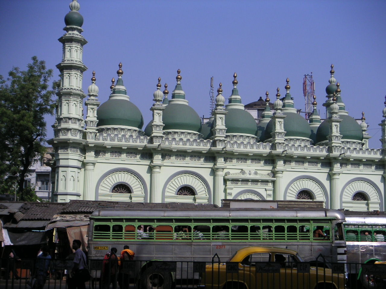 Kolkata.